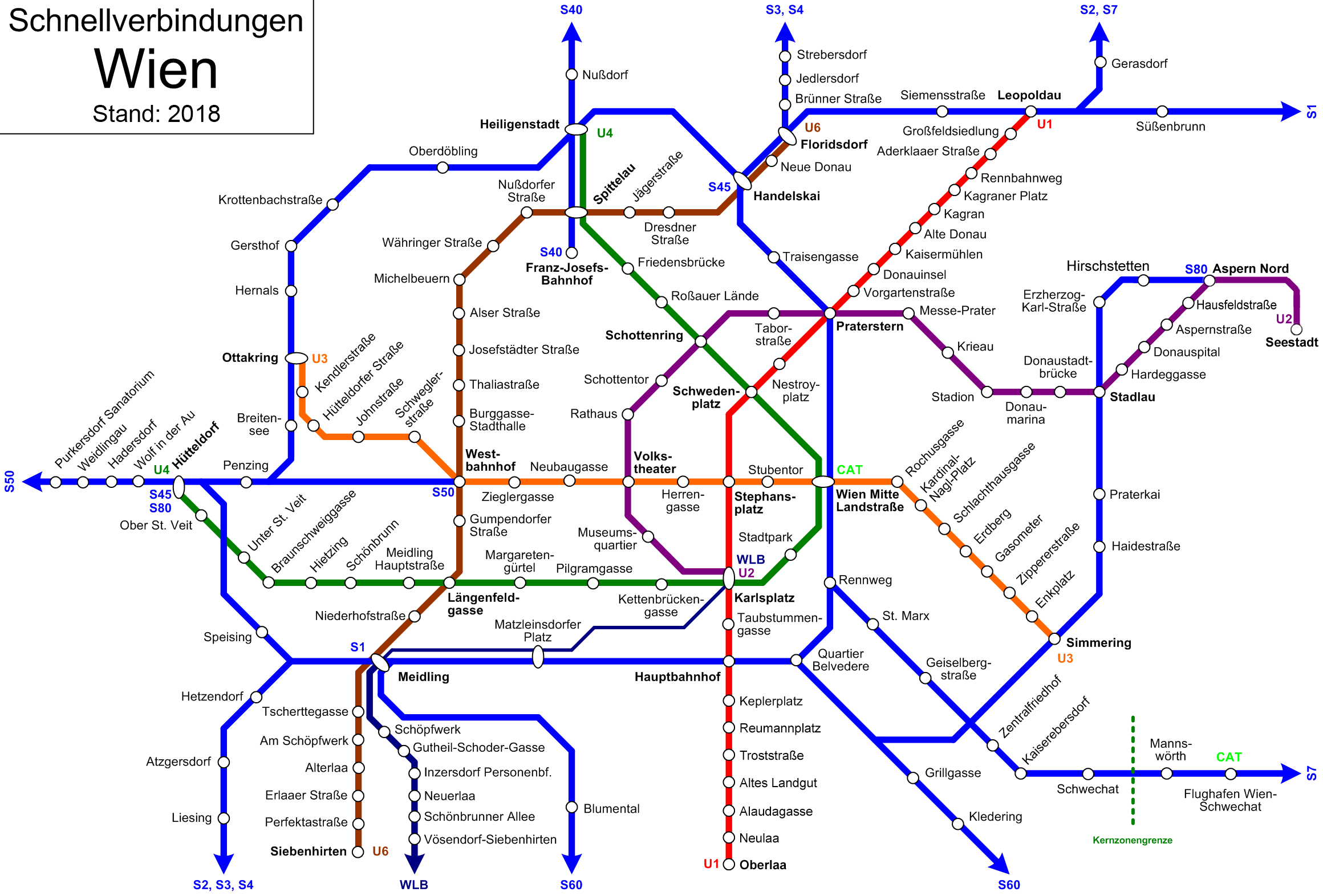 Schnellverbindungen in Wien